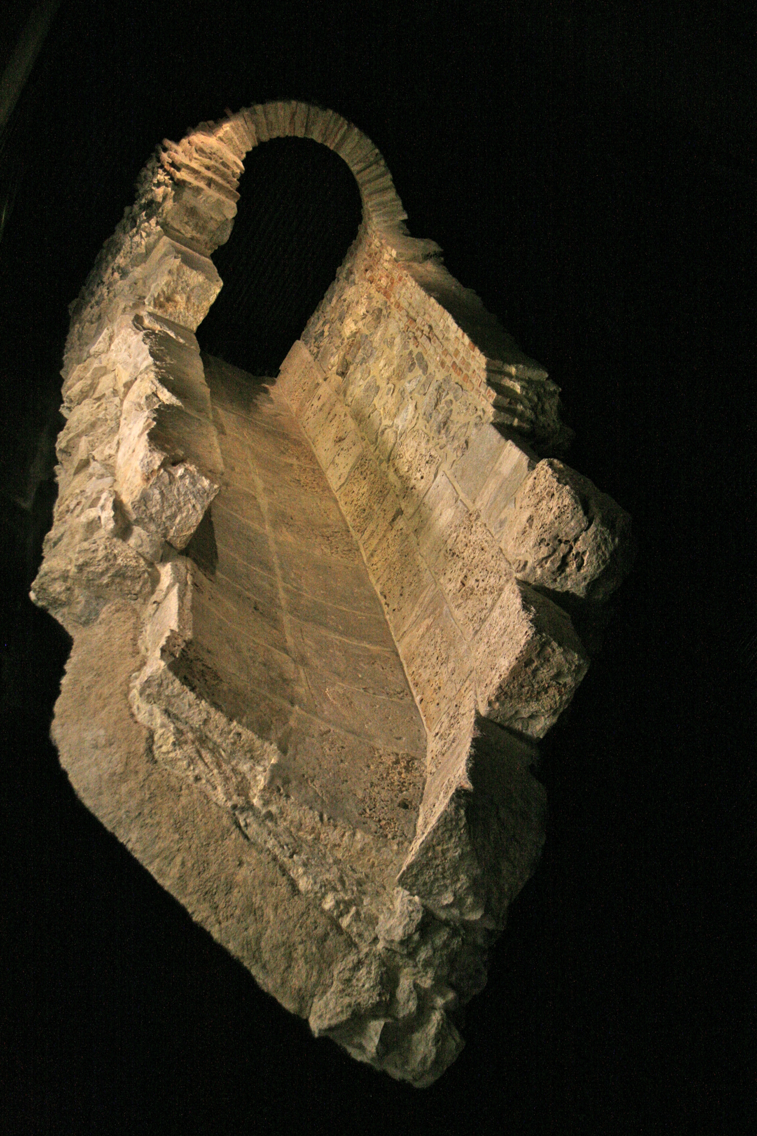 Viaje de agua - Fuente de los caños del Peral en la Plaza de Ópera (Madrid)